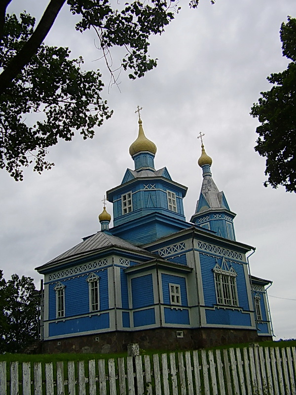 Ёдчыцы. Пакроўская царква